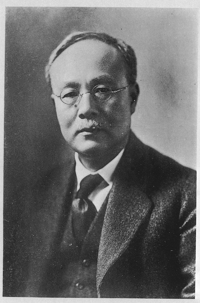 Portrait of Muto Sanji (武藤山治, 1867 – 1934)